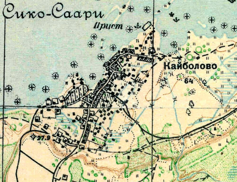 Топографическая карта Ленинградской области, квадрат О-35-9-В-а (Курголово), деревня Кайболово